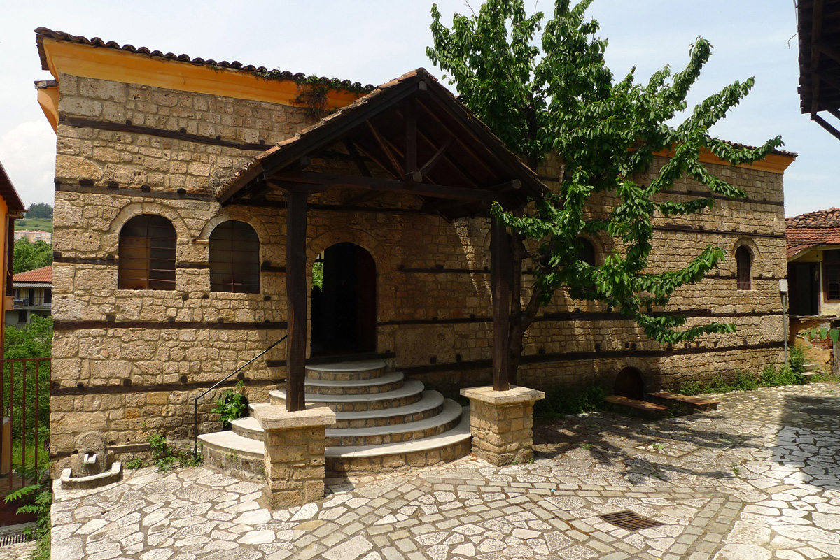 The Synagogue in Veria